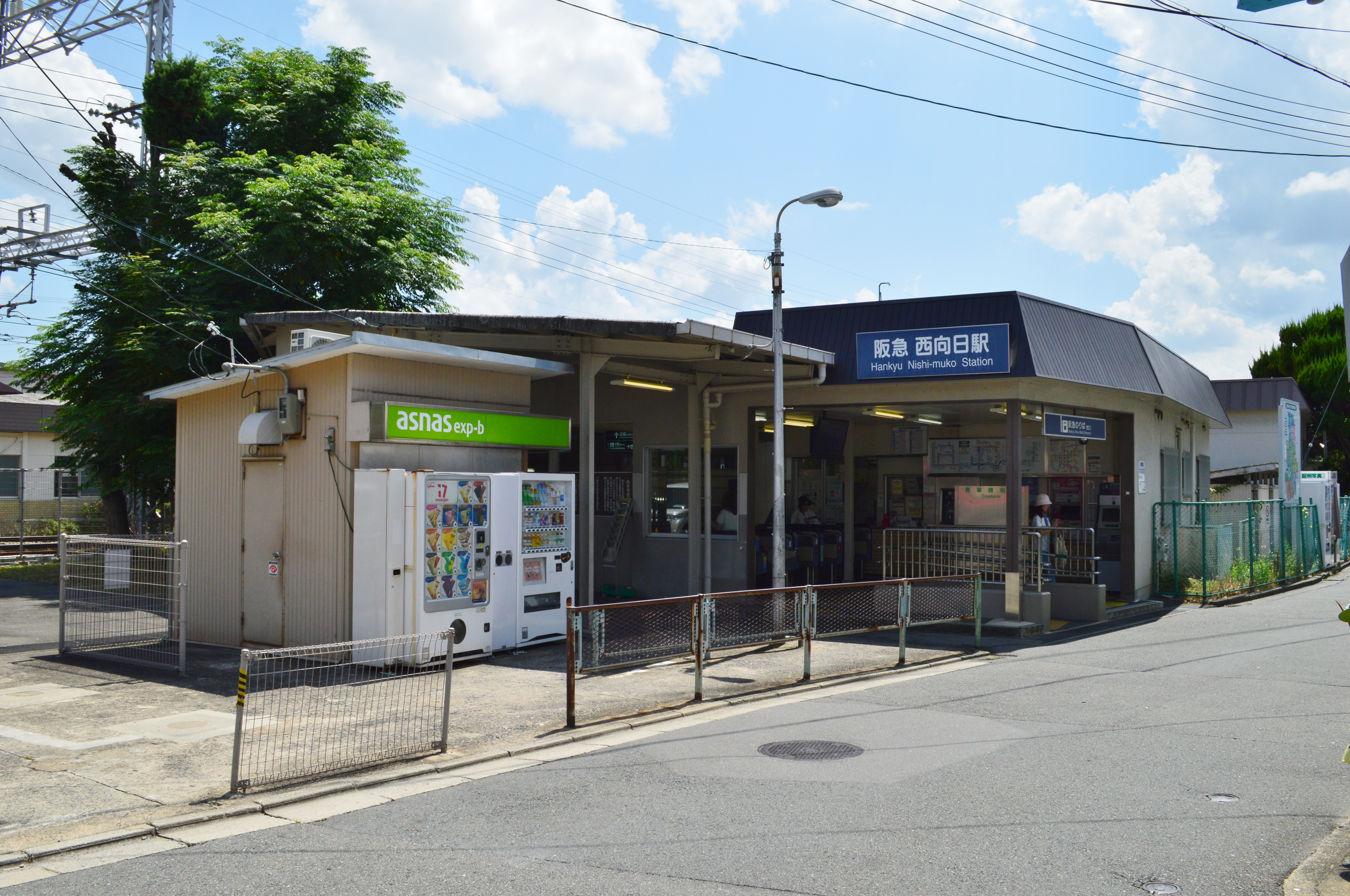 西向日駅 駅舎